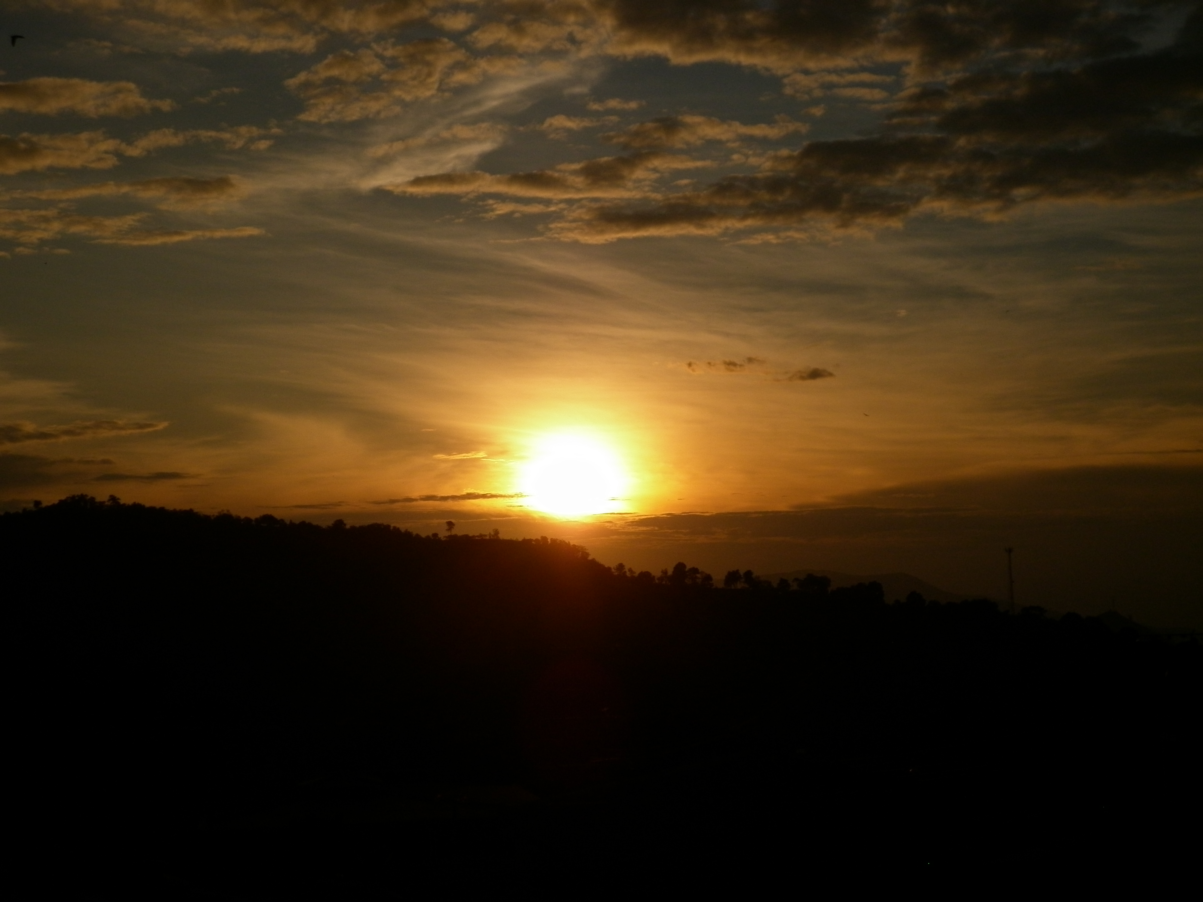 Fotografía de un atardecer en Arbeláez tomada desde el atrio de la Iglesia.